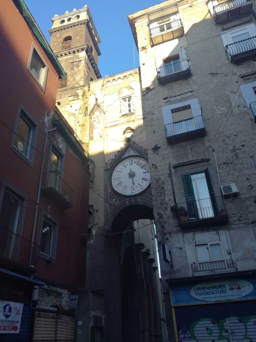 L'Arco di Sant'Eligio, Napoli